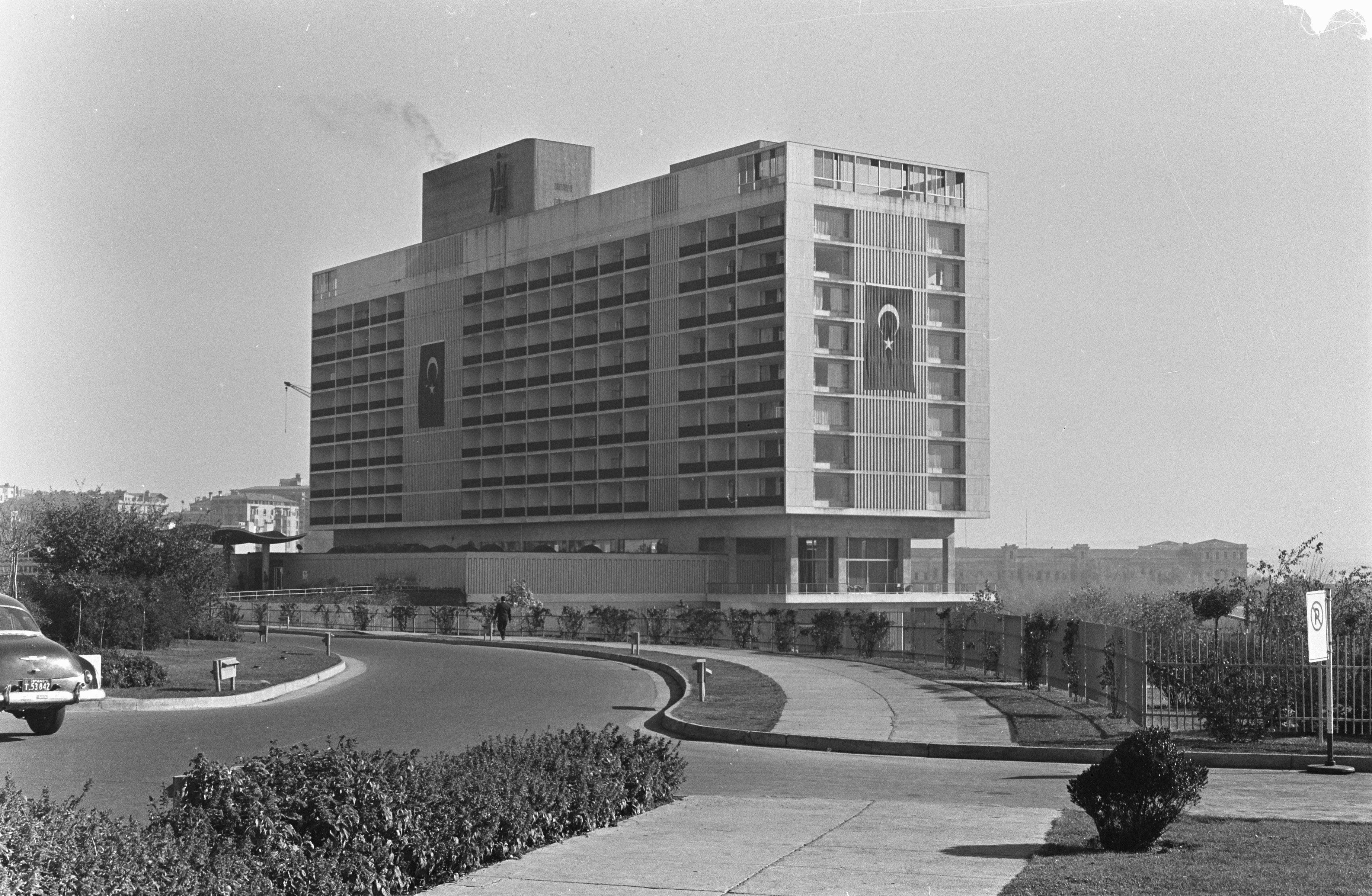 Collectie / Archief : Fotocollectie Anefo Reportage / Serie : [ onbekend ] Beschrijving : Vraagteken vlucht Lockheed Electra naar Istanbul Datum : 29 oktober 1959 Locatie : Istanboel Trefwoorden : steden Instellingsnaam : Lockheed Electra Fotograaf : Pot, Harry / Anefo Auteursrechthebbende : Nationaal Archief Materiaalsoort : Negatief (zwart/wit) Nummer archiefinventaris : bekijk toegang 2.24.01.05 Bestanddeelnummer : 910-7813